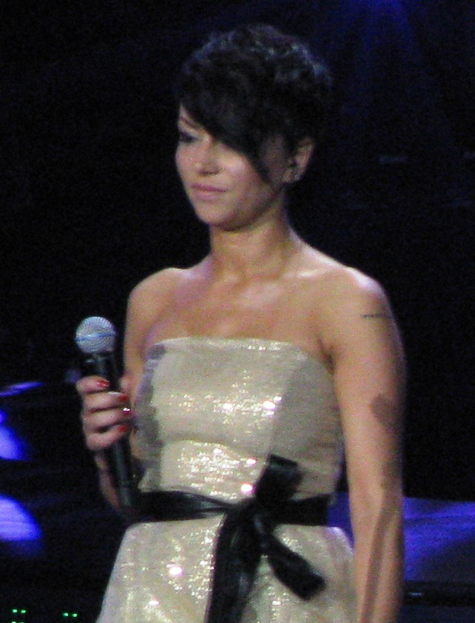 Paulina "Paulla" Ignasiak